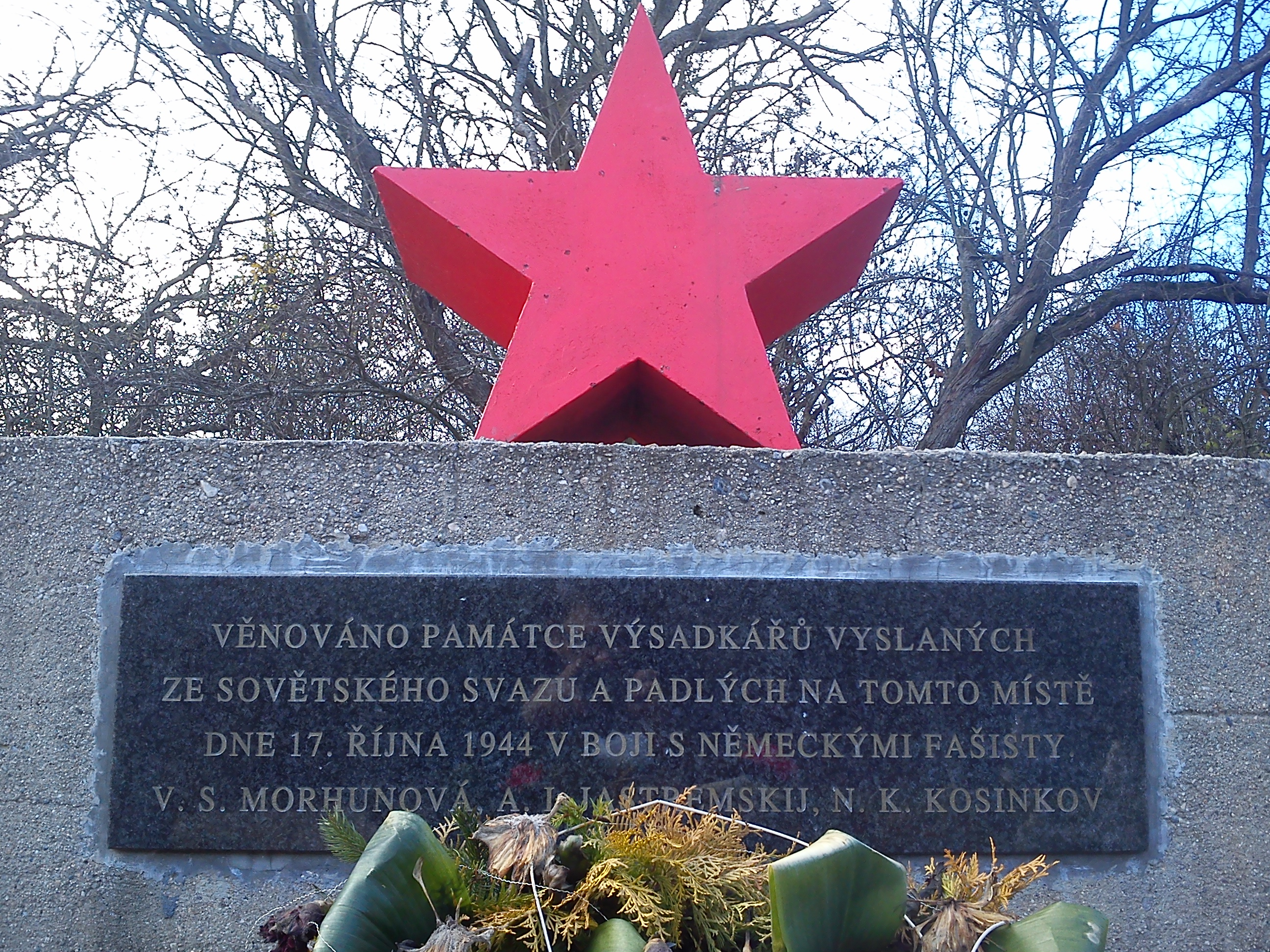 Pamětní deska s dominantní rudou hvězdou